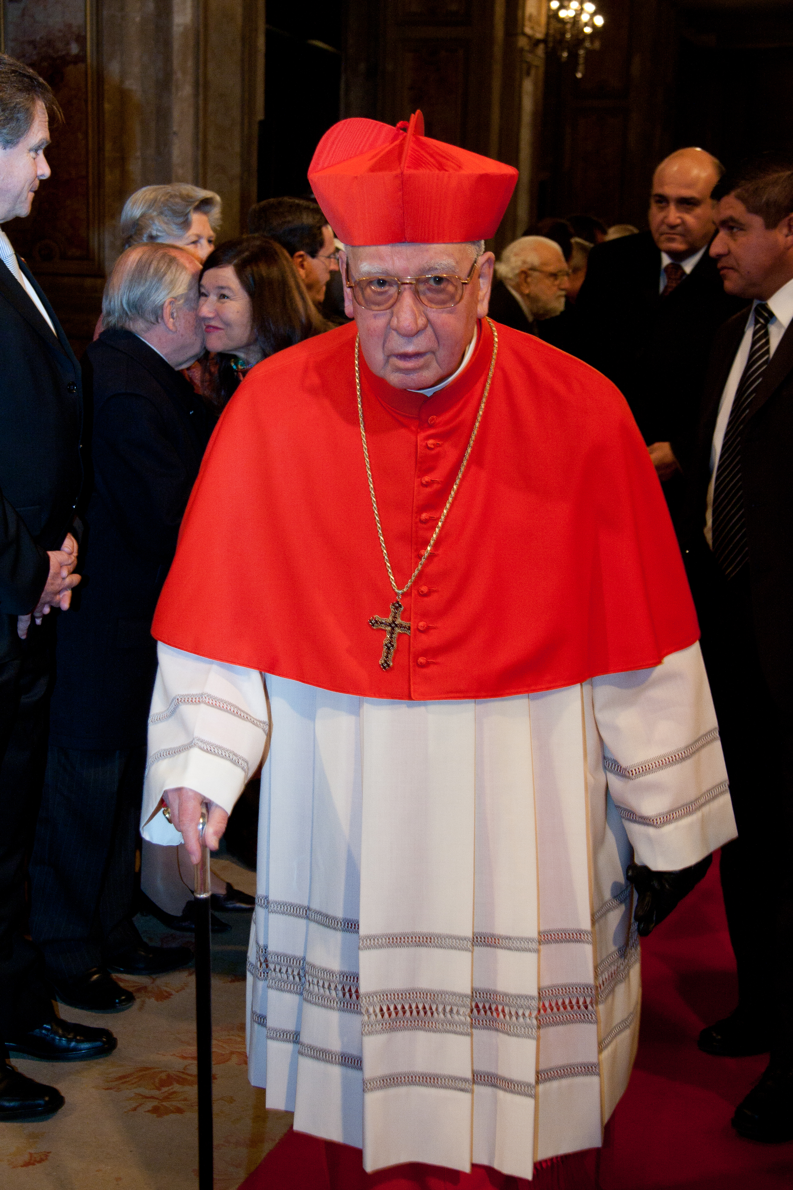 Una promesa solemne de los parlamentarios para poner todo el empeño “en hacer de Chile una Patria de hermanos, donde cada uno tenga pan, respeto y alegría, donde reine la paz, la justicia, la solidaridad, y para que Chile sea una nación bendecida por Dios, tierra de encuentro y esperanza” fue uno de los momentos culminantes del Te Deum Ecuménico, el segundo de los eventos de conmemoración del Bicentenario del Congreso Nacional, realizada este domingo 3 de julio del 2011.